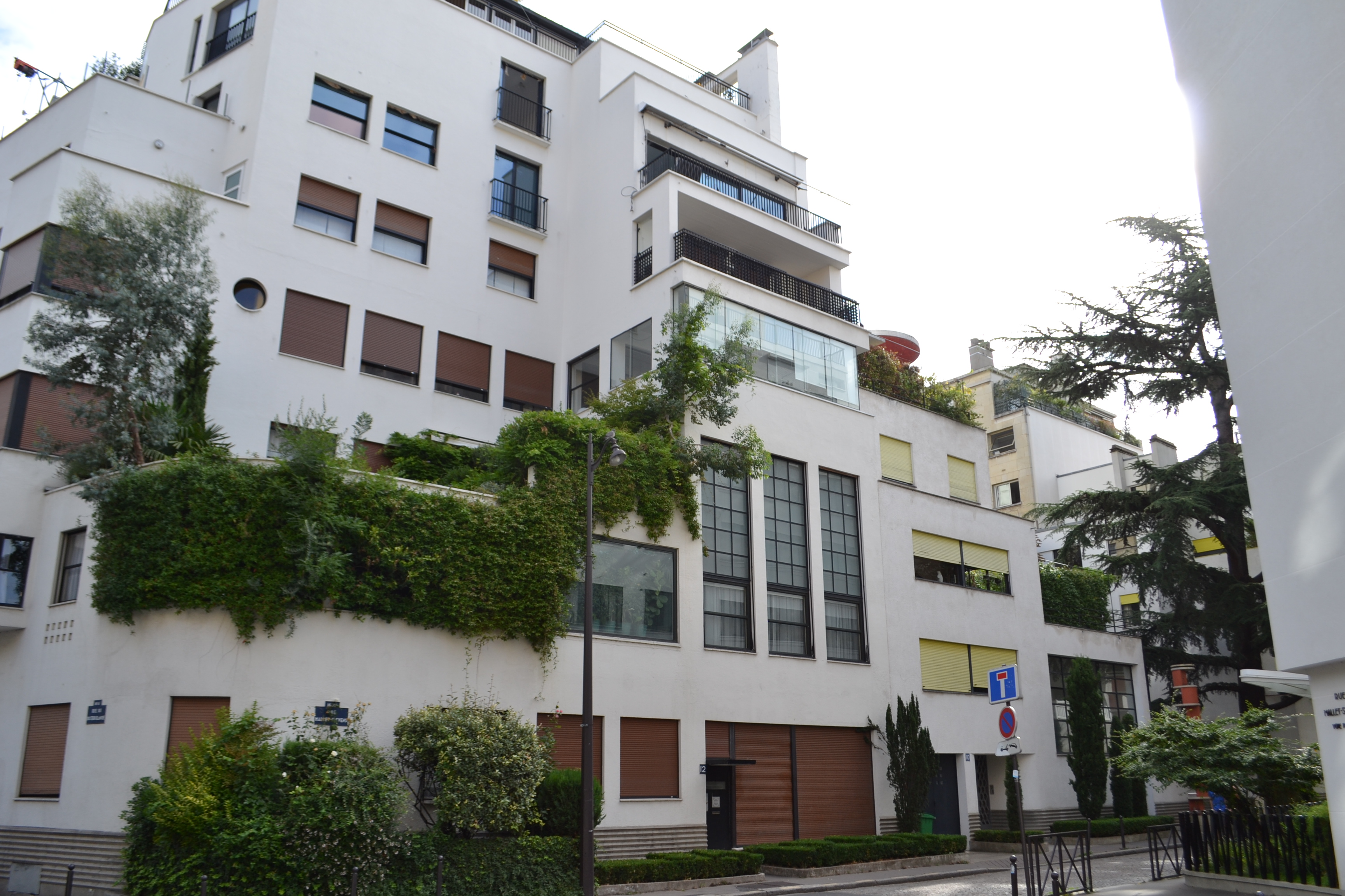 12, rue Mallet-Stevens, Paris 16e - et 10 : ancienne maison-atelier des sculpteurs Martel (droite du cliché).